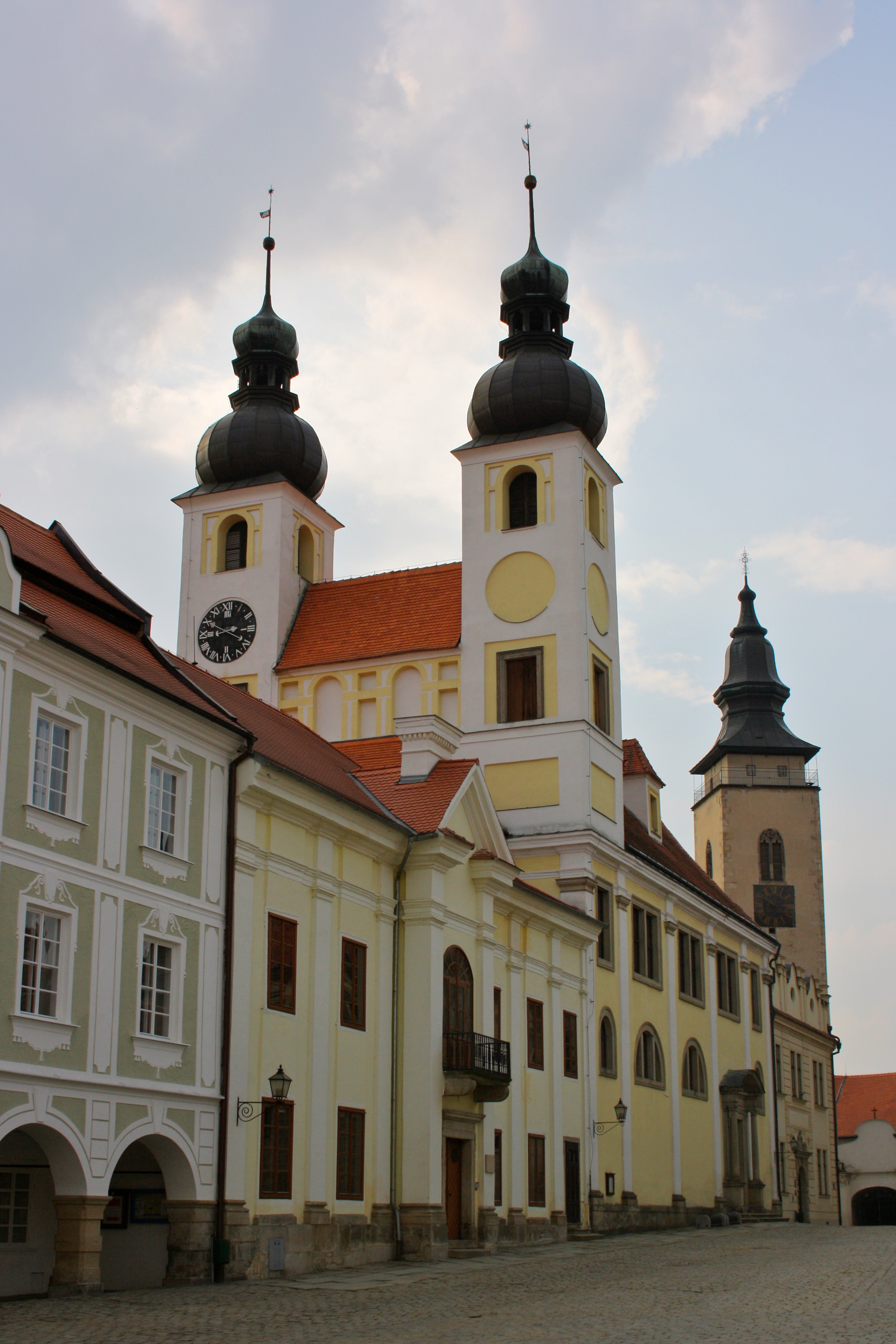 Kostel Jména Ježíš (Telč), nám. Zachariáše z Hradce, Telč